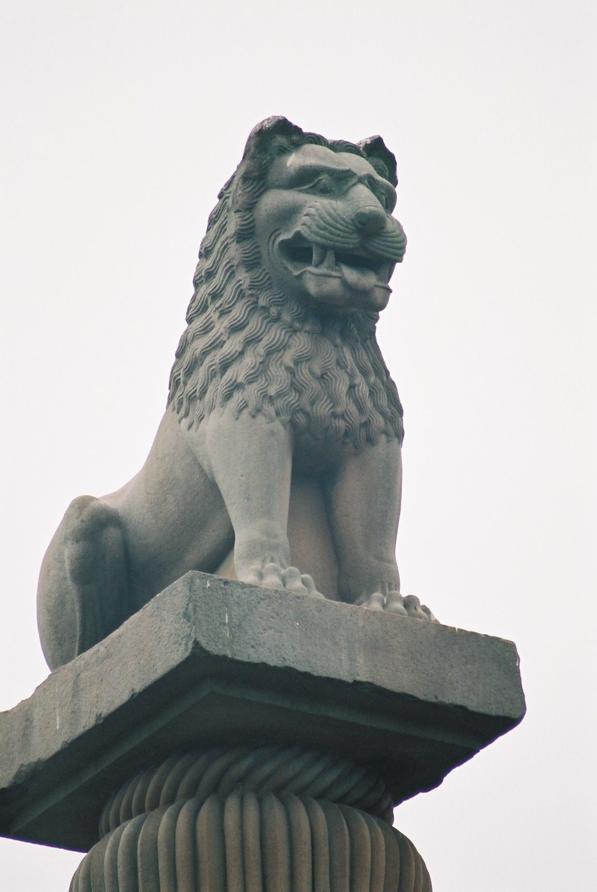 アショーカ王柱の獅子柱頭。 なかなか可愛らしくて良い顔をしてますね。 (2005/01/24 Vaishali, Bihar, INDIA)